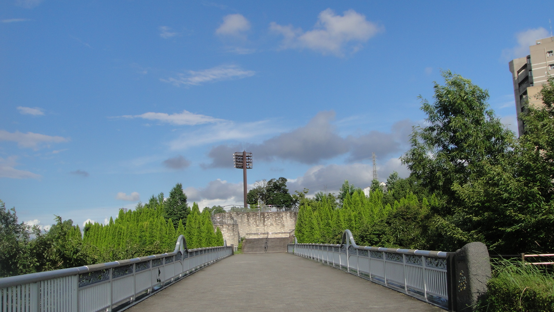 上柚木公園内の山吹橋